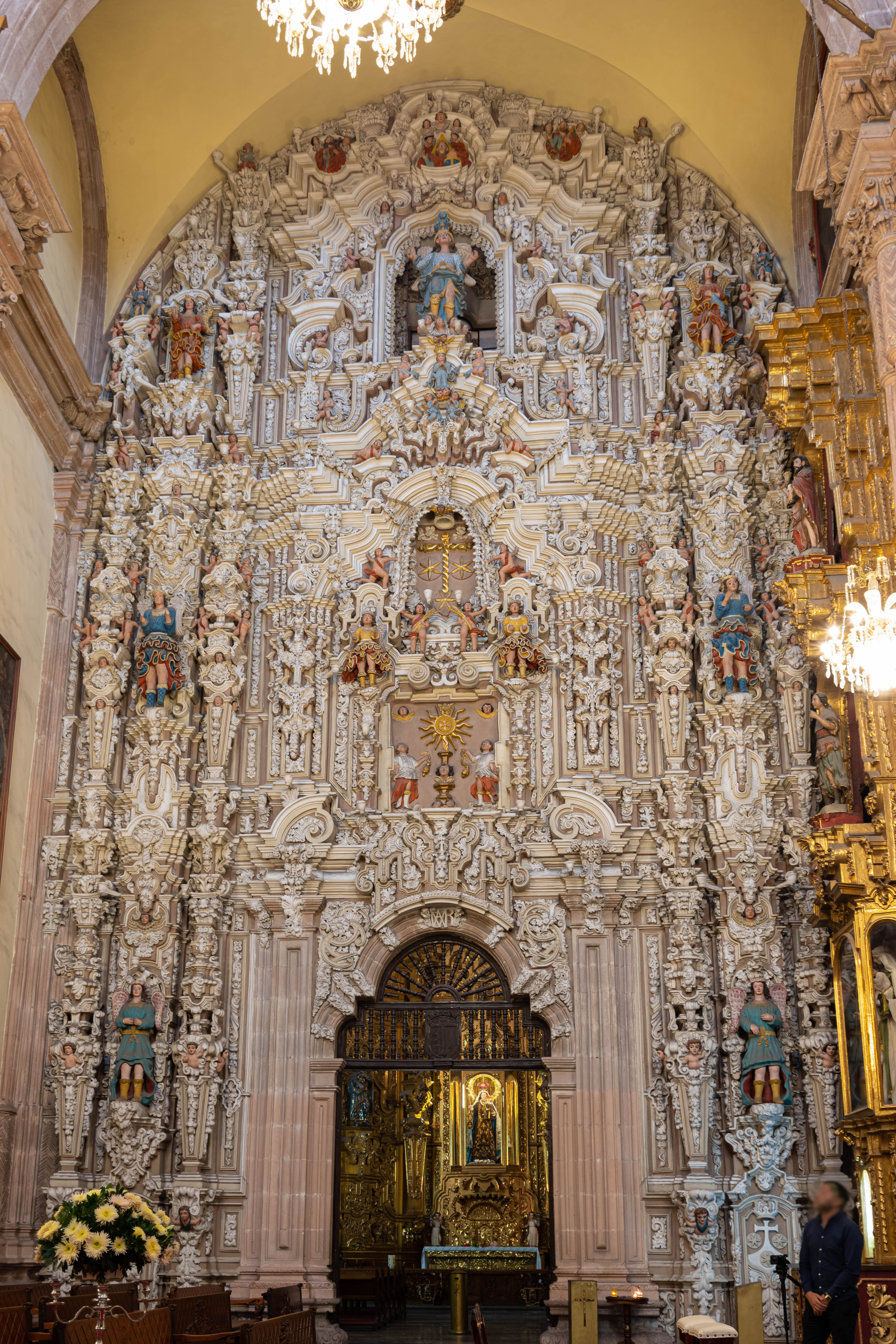 Retablo de estilo churrigueresco en el interior del templo del Carme